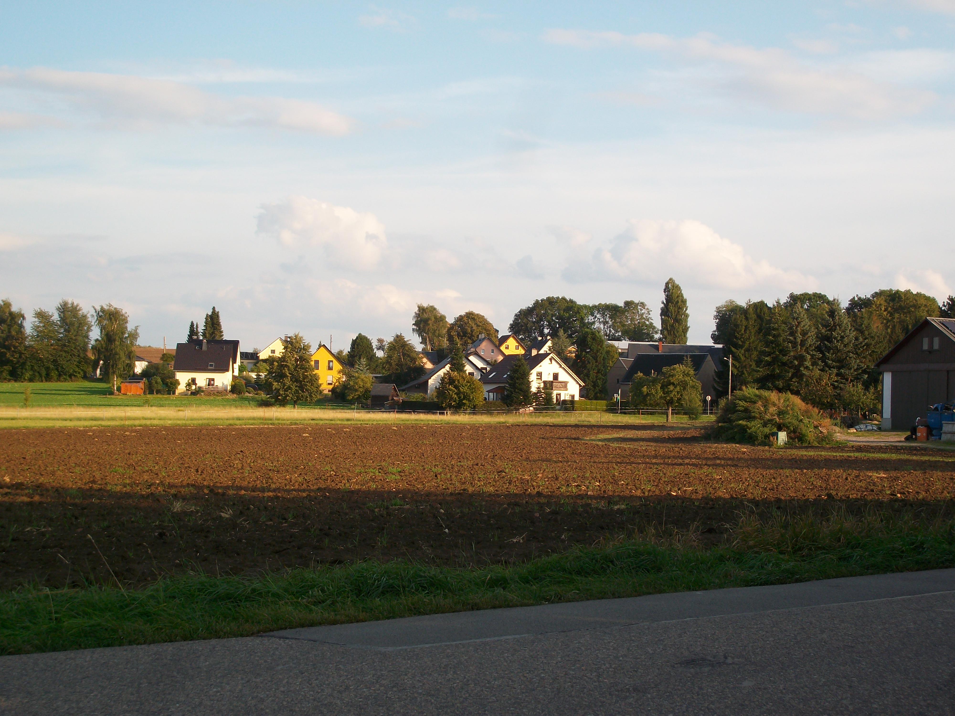 Blick auf Meinsdorf